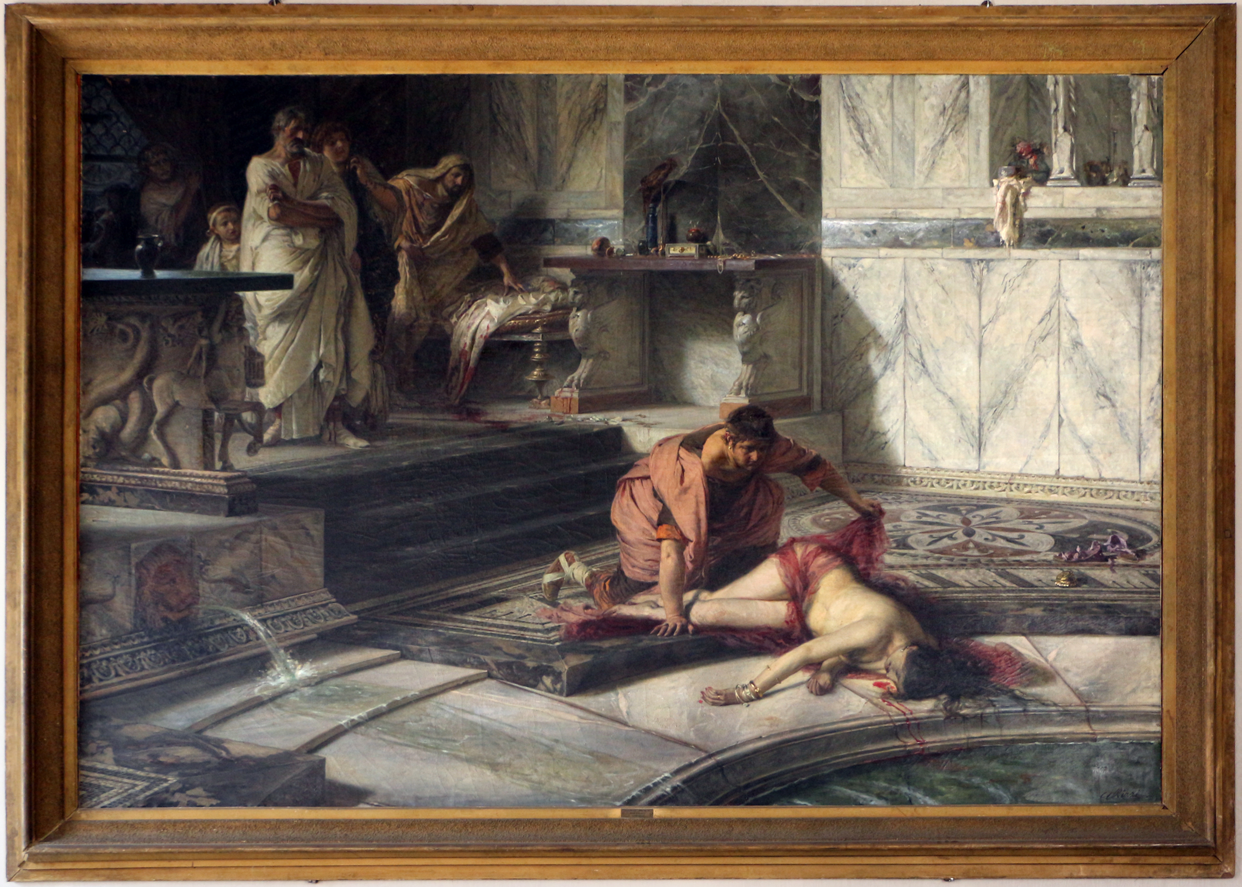 Palazzo Comunale This is a photo of a monument which is part of cultural heritage of Italy.